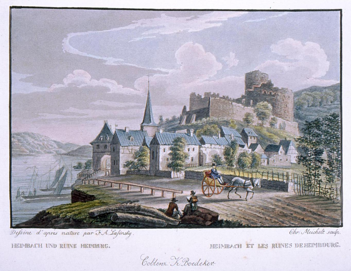 Altkolorierter Aquatintastich von Christian Meichelt nach Vorlage von J.A. Lasinsky um 1830